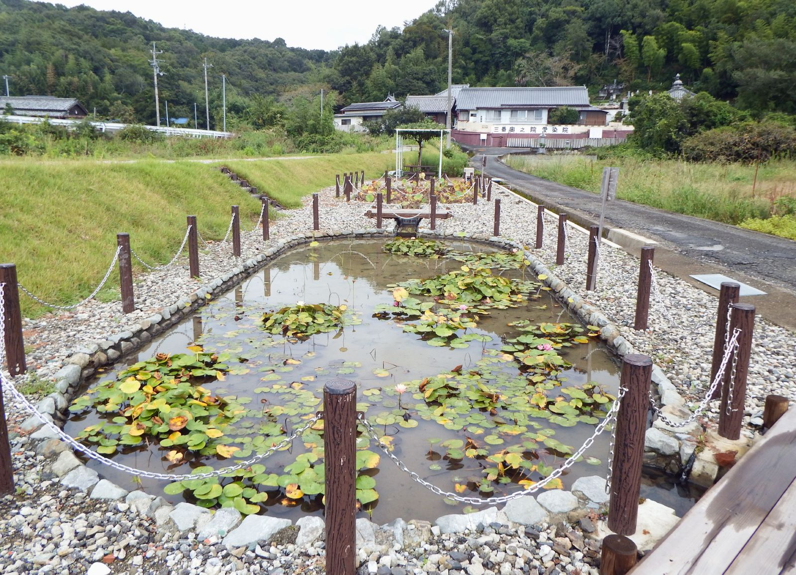 愛染院の進入道の脇にある親水公園